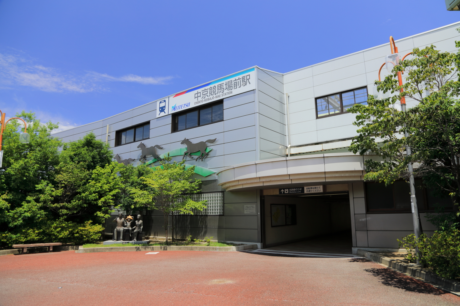 中京競馬場前駅南口（2018年）